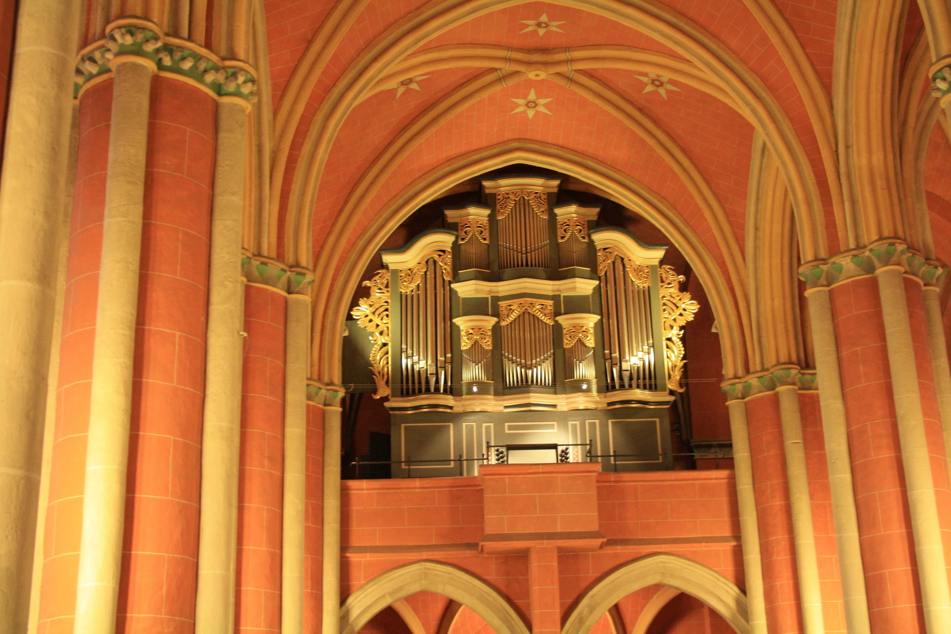 Orgel der Stiftskirche in Wetter (Hessen)